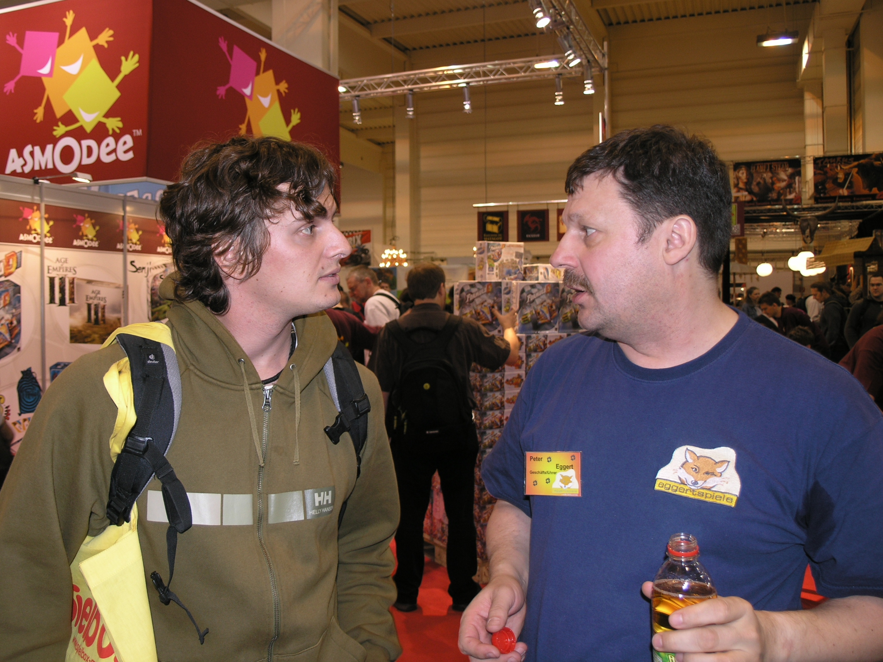 Internationalen Spieltage SPIEL 2008